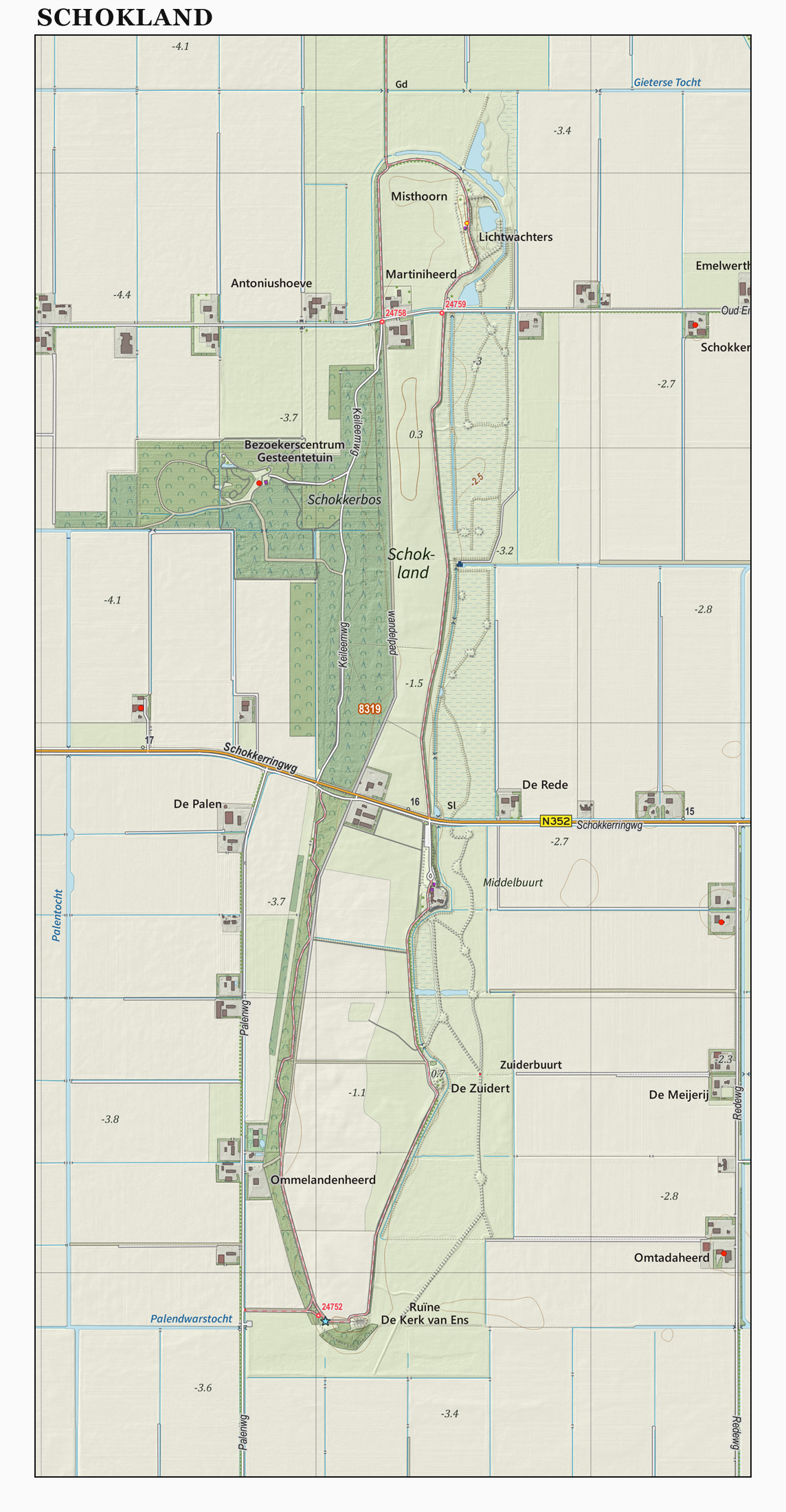 Topografische kaart van Schokland (natuurgebied). Resolutie: 400 pixels/km. Samengesteld door Jan-Willem van Aalst op basis van de GML open geodata van de BRT/Top10NL (basisregistratie Topografie, Kadaster), vrijgegeven door Kadaster onder de Creative Commons BY licentie. Additionele gegevens uit BAG uit de Open Street Map en uit de Risicokaart. Zie ook de Legenda.